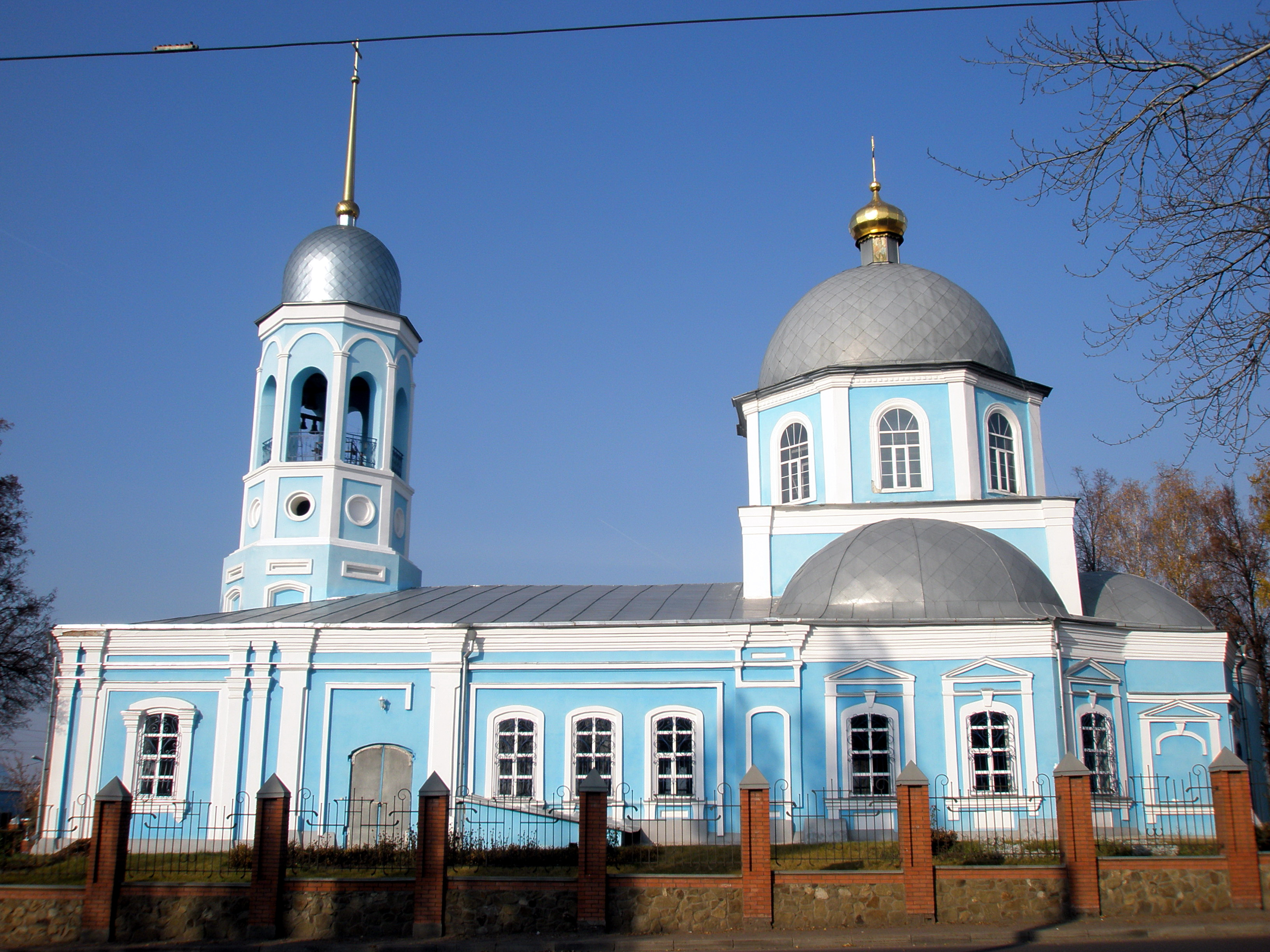 Храм Введения Пресвятой Богородицы во Храм в Железнодорожном округе города Курска на пересечении улиц Дубровинского и Маяковского.